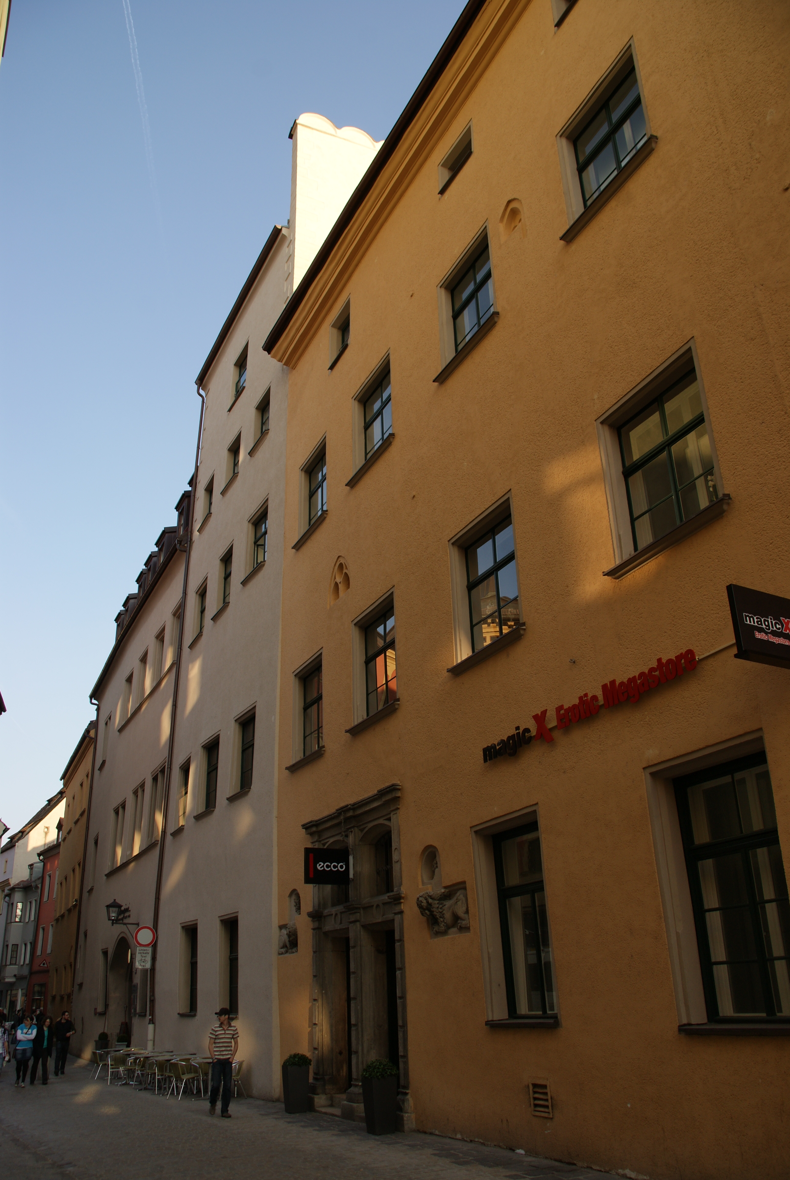 Zanthaus, westlicher Bauteil, im Vordergrund Ingolstetterhaus (Gesandtenstraße 5)This is a photograph of an architectural monument.